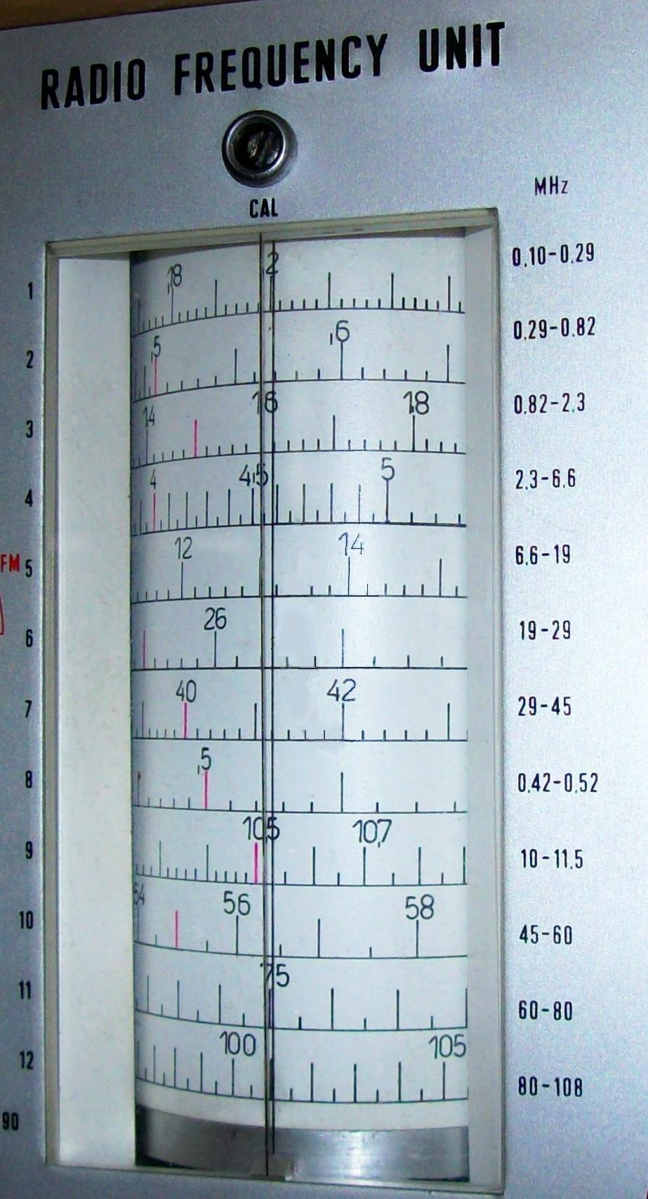 Trommelskale / drum scale from a HF generator